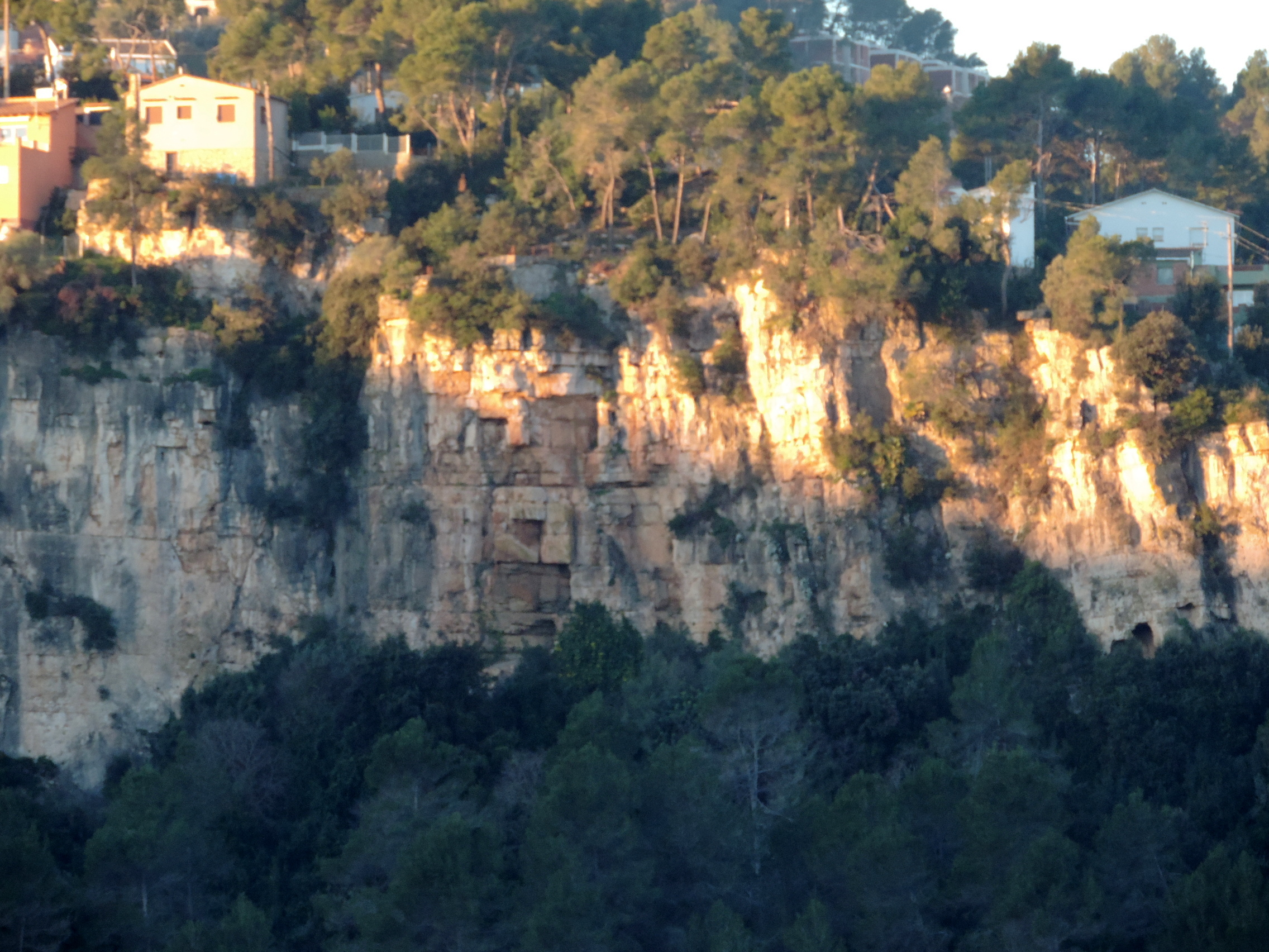 La «cara de Tabà», formació geològica peculiar a les penyes de Tabà (la Palma de Cervelló), sobre del jaciment arqueològic de la Cova dels Dos.